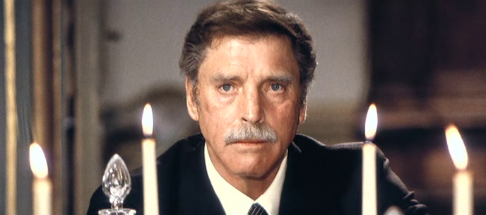 Una scena del film Gruppo di famiglia in un interno